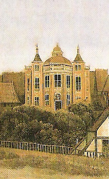 Ansicht des Neuen Lusthauses um 1650